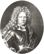 Karl Wilhelm (Anhalt-Zerbst)